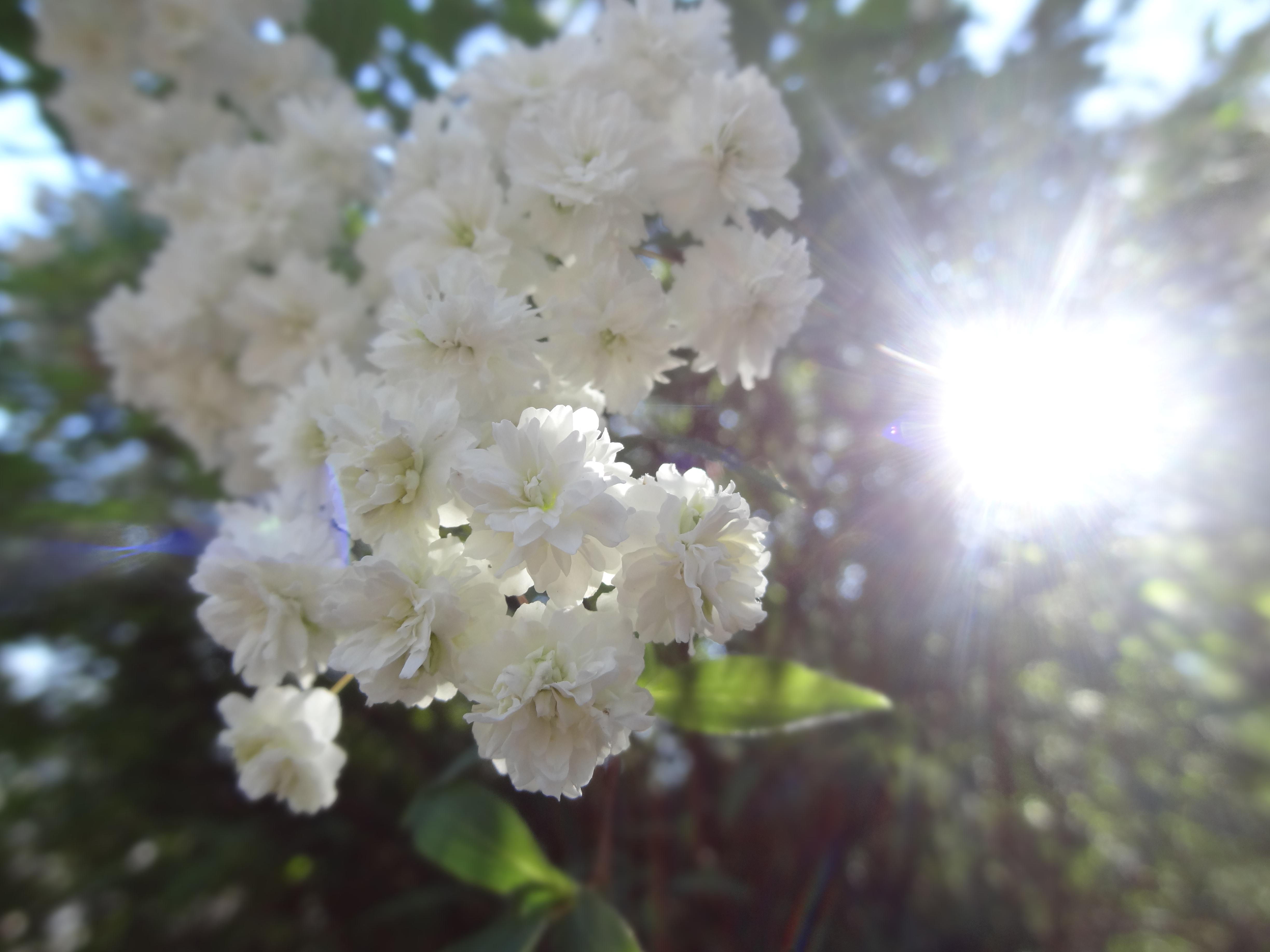 Flores fotografadas no Penedo da Saudade (Coimbra)